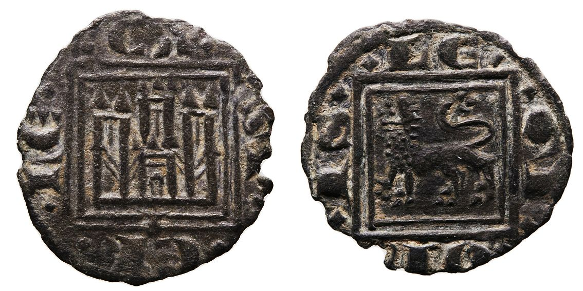 Óbolo de vellón acuñado en La Coruña durante el reinado de Alfonso X. El anverso (a la izquierda en la imagen) muestra un castillo con una venera antigua debajo, rodeado por la leyenda "CA·ST·EL·LE" (es decir, "de Castilla"); el reverso, un león rodeado por la leyenda "LE·GI·ON·IS", es decir "de León".